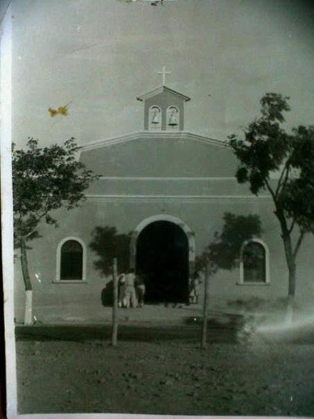 Pueblo